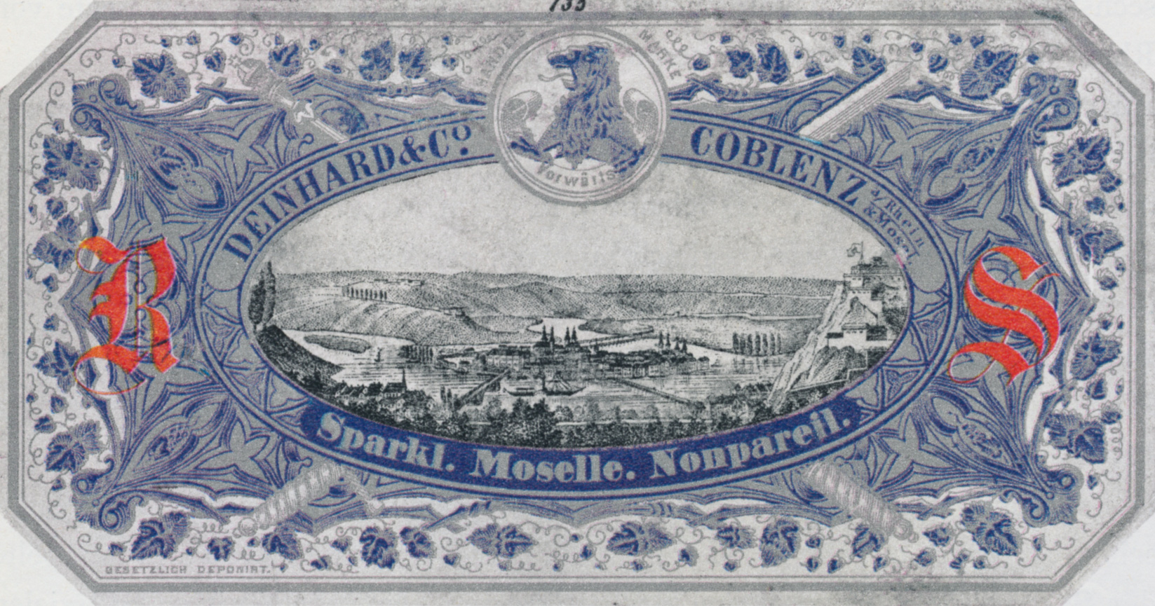 Deinhard-Etikett aus dem späten 19. Jhd., reproduziert in "Deinhard. Erbe und Auftrag", 1969